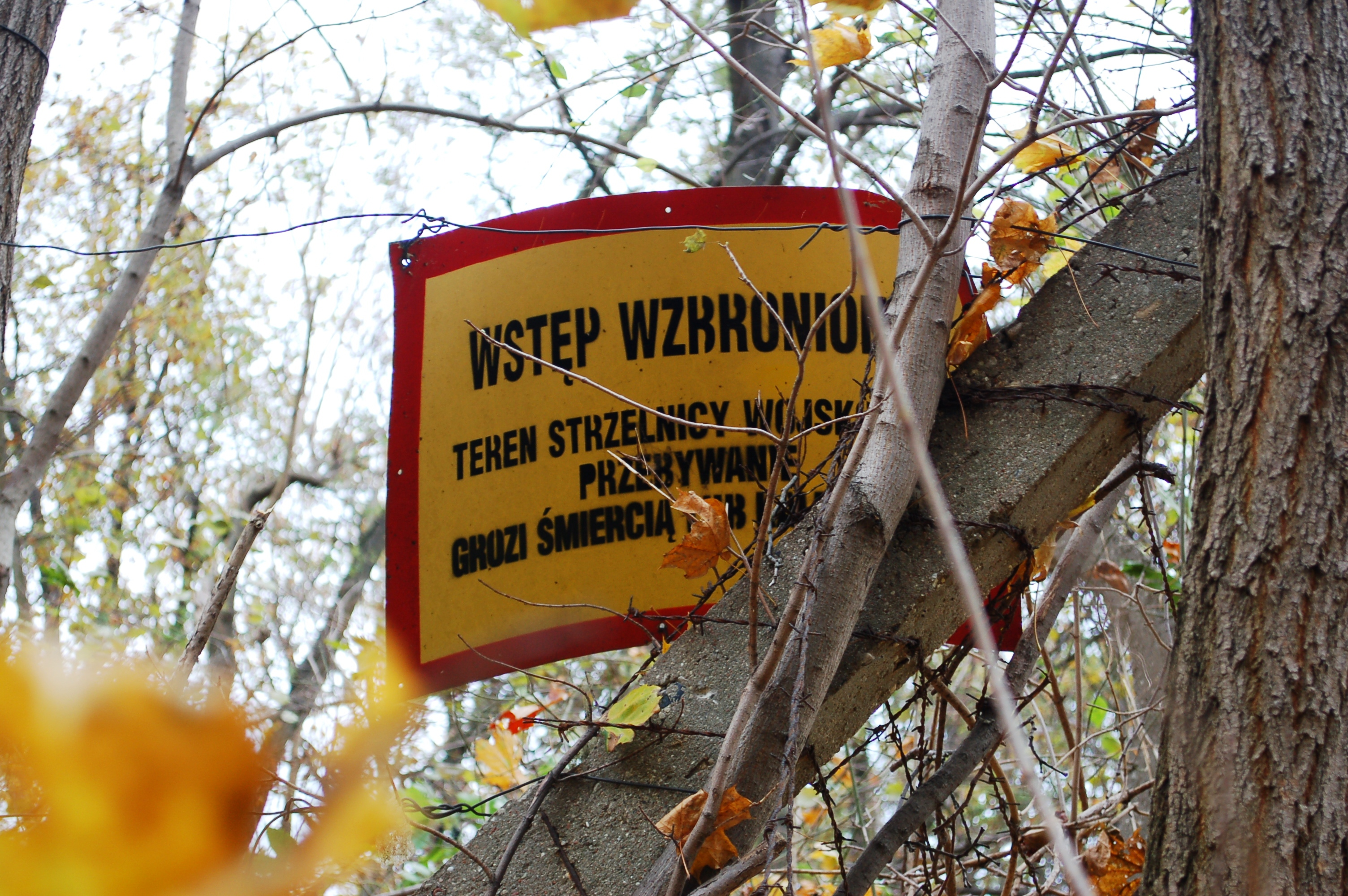 Small Fort of Zegrze Fortress